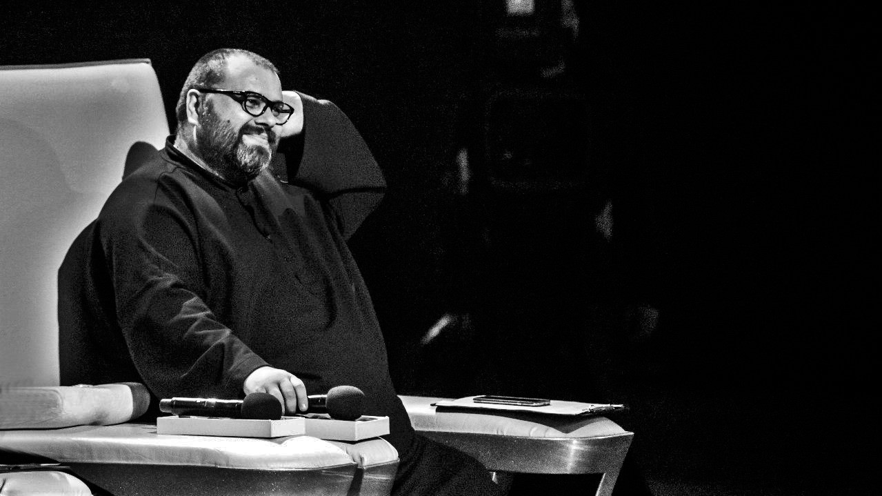 Проект "Главная сцена".